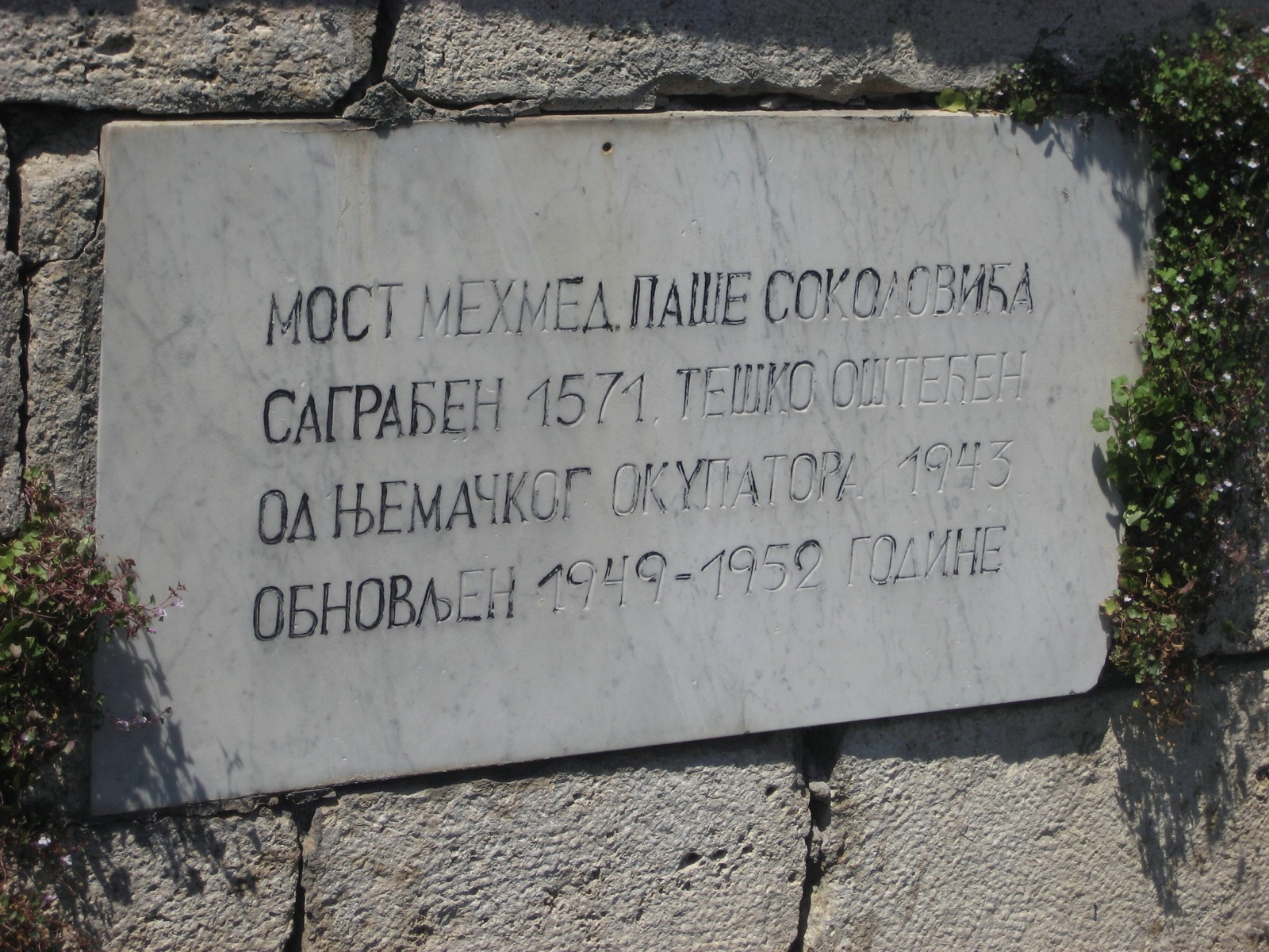 Плоча на Вишеградском мосту